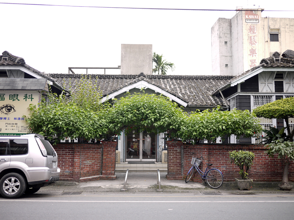 羅東五福診所